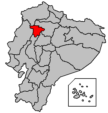 Ubicación de esta provincia en el Ecuador